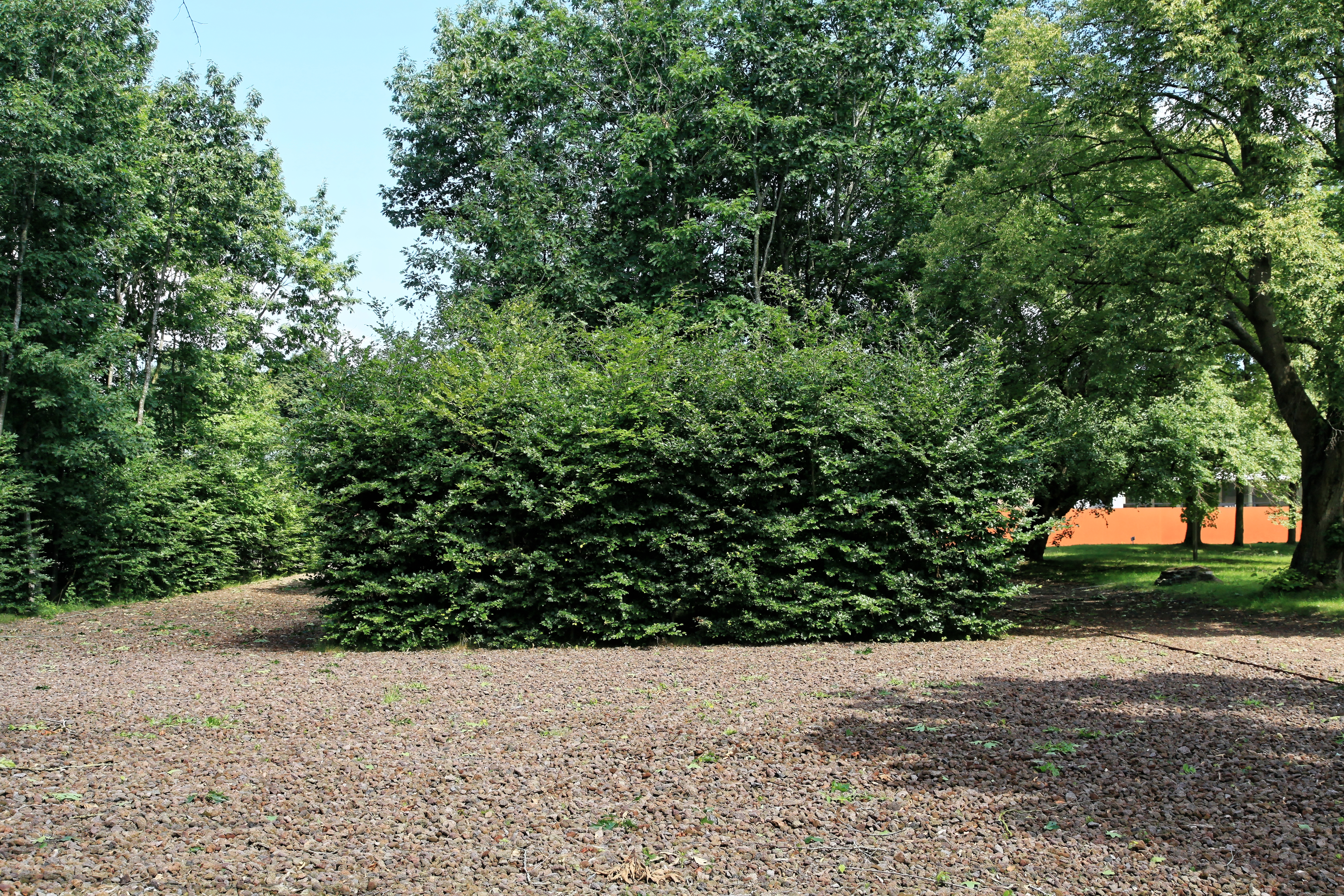 Gedenkstätte Esterwegen, Hinterm Busch in Esterwegen